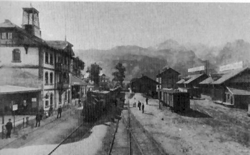 Alter Bahnhof Garmisch-Partenkirchen im Jahr 1889